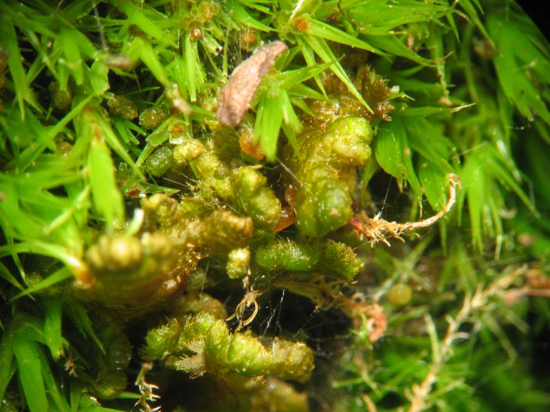 Behaartes Federchen-Lebermoos (Ptilidium ciliare), Rostock